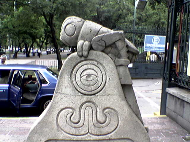 Escultura representando a un chapulín en Chapultec (cerro de los chapulines), Museo de Arte Moderno, Ciudad de México. Chapulin, Sculpture, Museo de Arte Moderno, Mexico City, photo by Maurice Marcellin